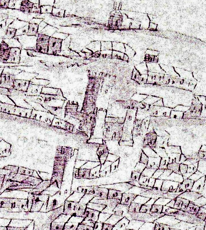 Il castello Barresi Branciforte di Militello in Val di Catania in un disegno del 1569.